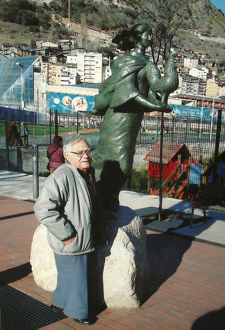 L'escultor Sergi Mas Balaguer al costat de la seva obra Arnaldeta de Caboet, situada al Prat del Roure, Escaldes-Engordany (prin. d'Andorra)